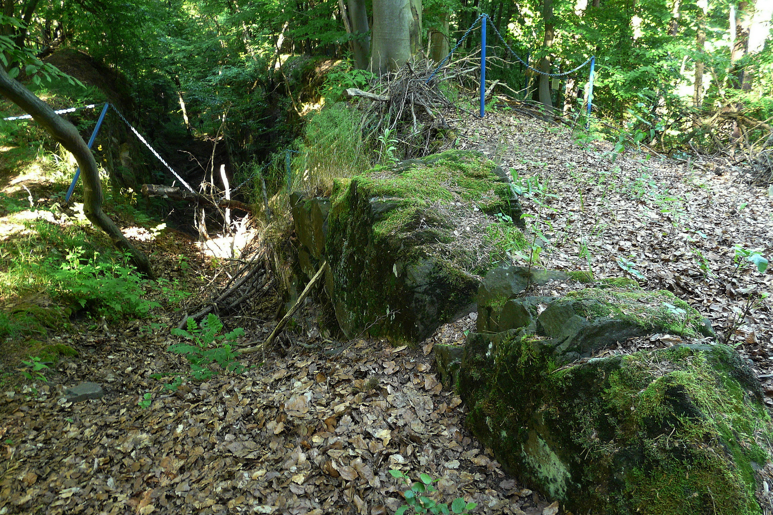 Zbytek stěny